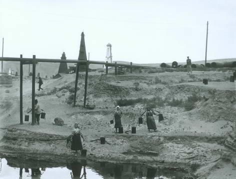 Нефтепровод на окраине Черного Города. Фото К.Буллы 1905г.